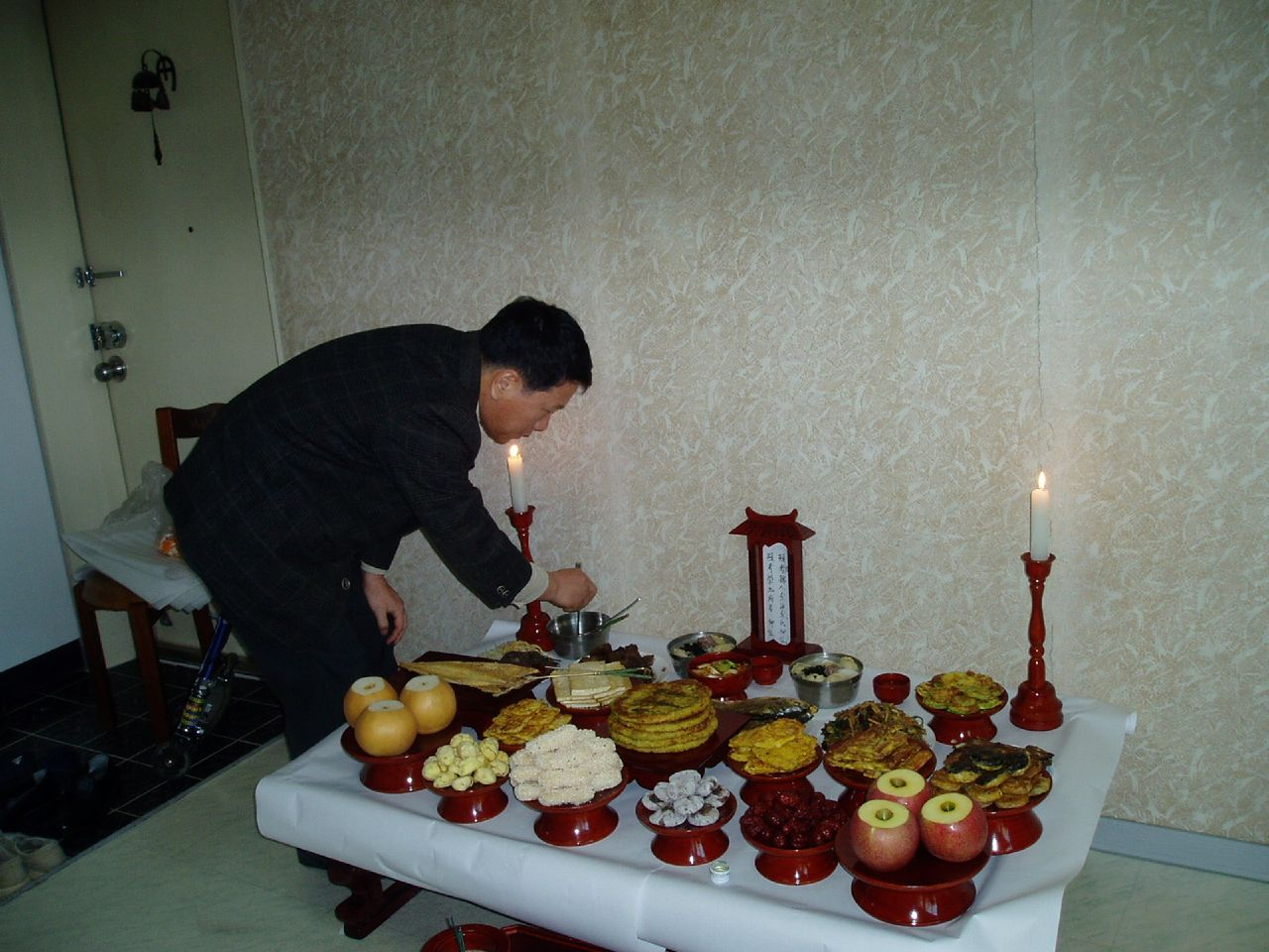 Jesa